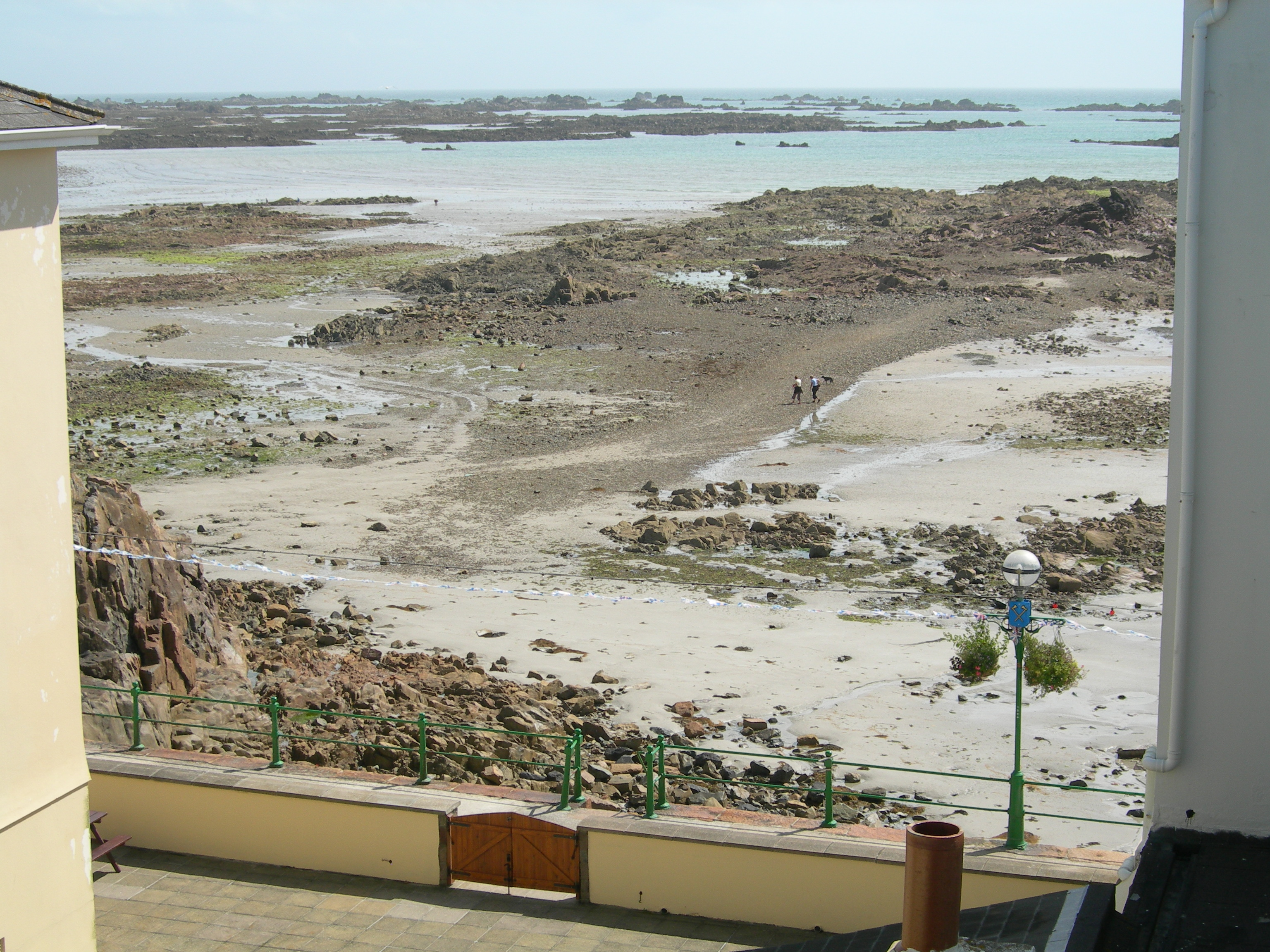 Basse mer au Havre des Pas, Saint-Hélier, Jersey